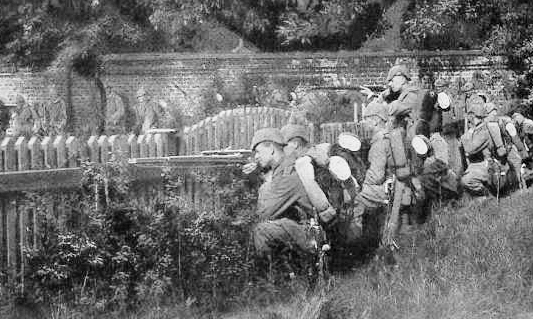 Truppe tedesche in azione durante la campagna dell'estate 1914 sul fronte occidentale (tratta da cartolina postale)